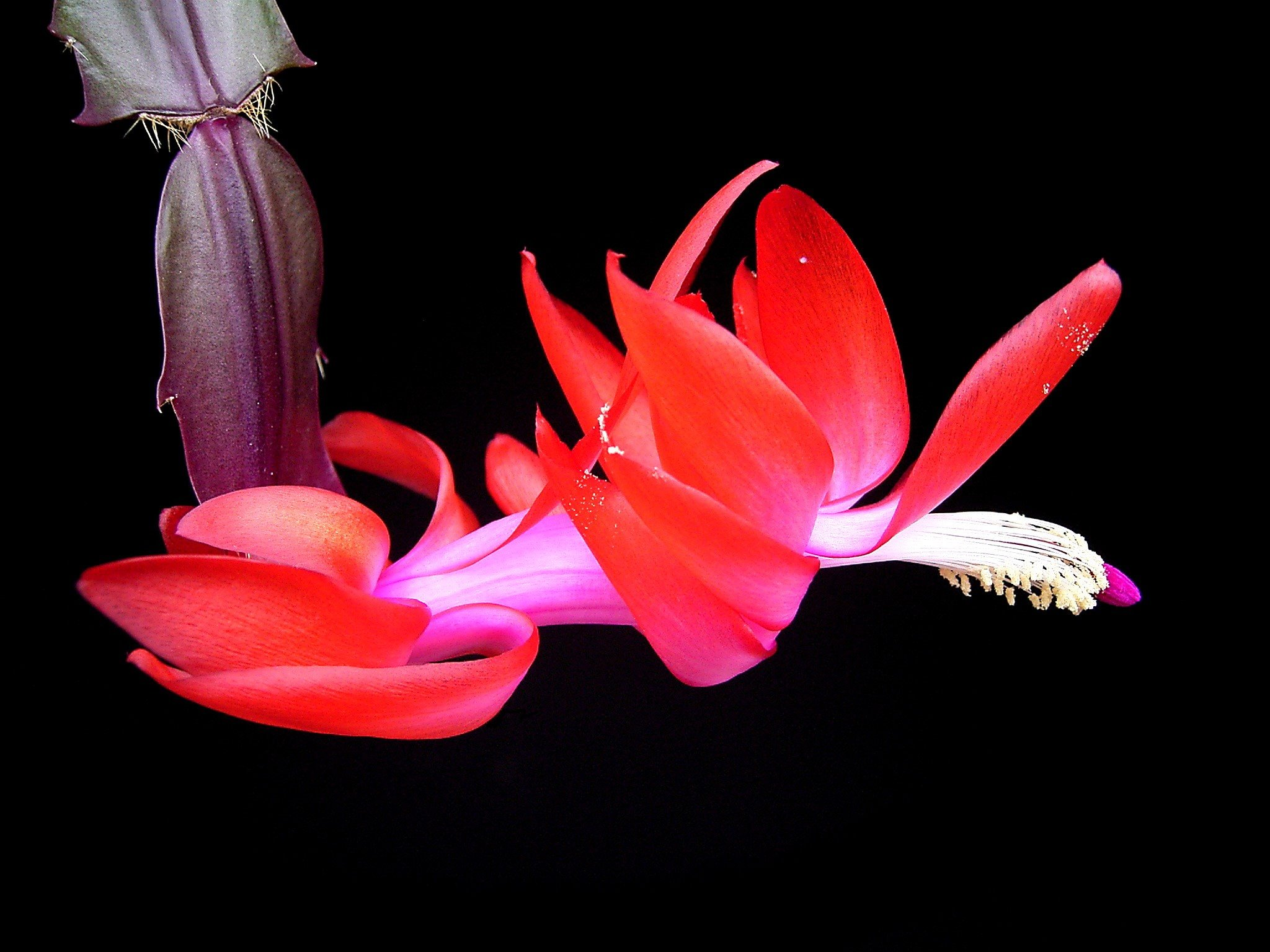 Schlumbergera